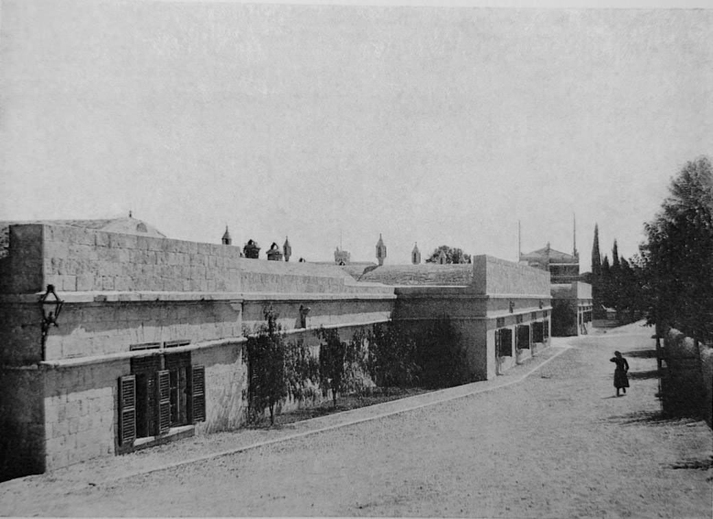 Мариинское женское подворье Императорского Православного Палестинского Общества в Иерусалиме. Фото Ф.М. Тимона. 1907 г.